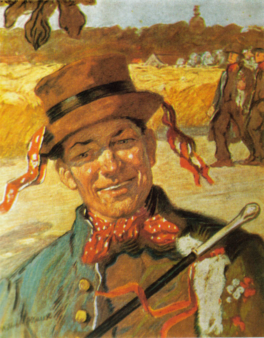 Hochzeitsgast in Schleifer Tracht um 1905. Hornjoserbsce: Kwasny hósć, wokoło 1905